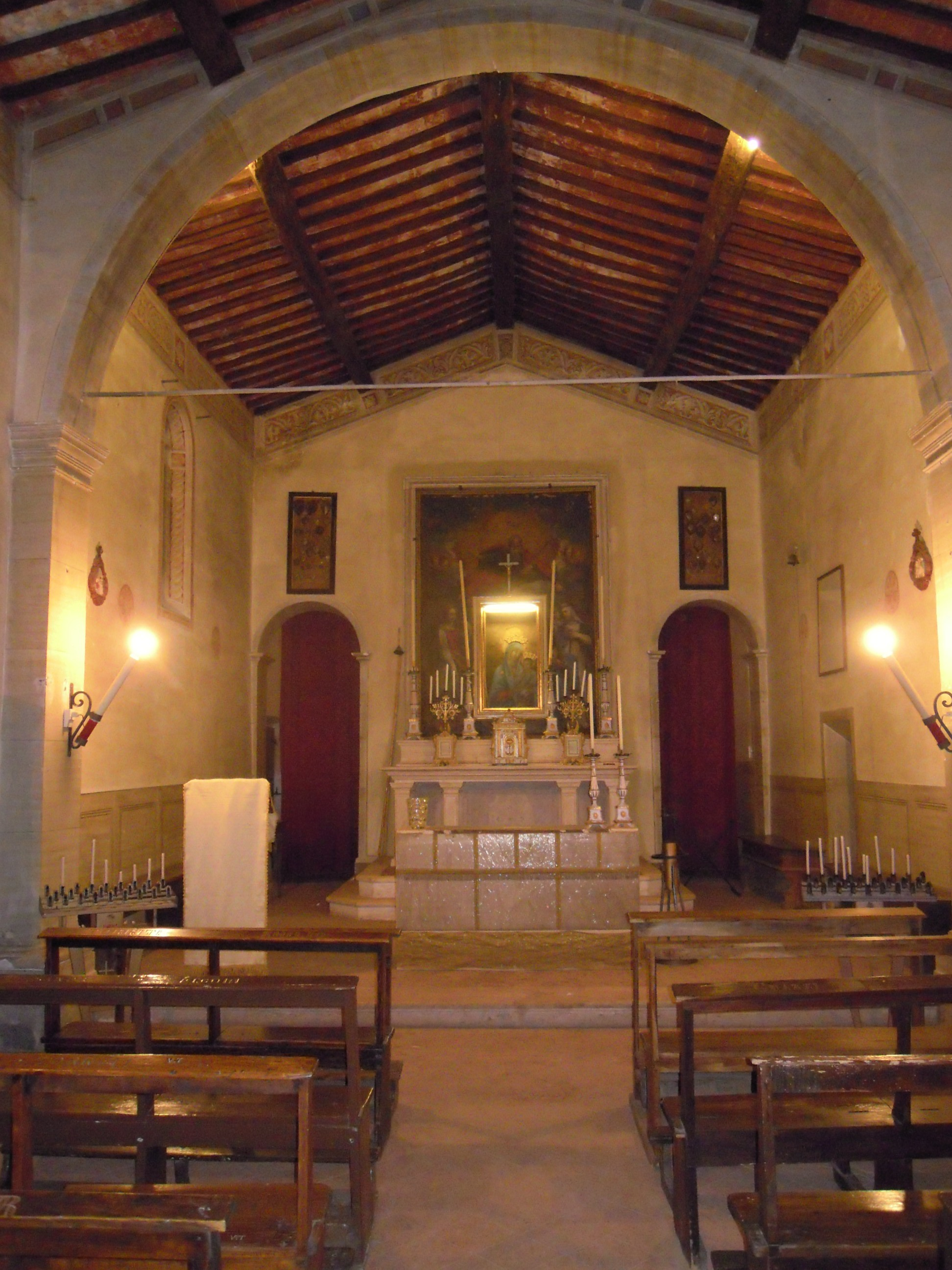 L'interno a navata unica del Santuario della Madonna delle Nevi, in Montisi. Sull'altare, l'immagine miracolosa della Madonna.